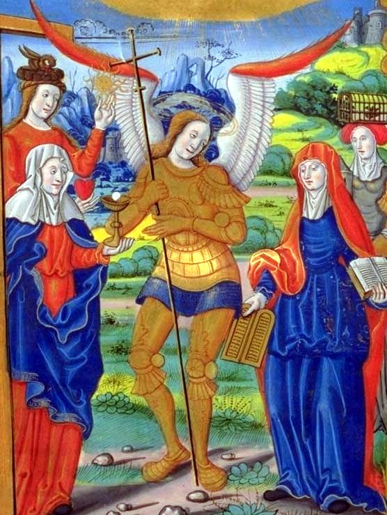 Hl. Michael mit Allegorien des Glaubens und der Kirche